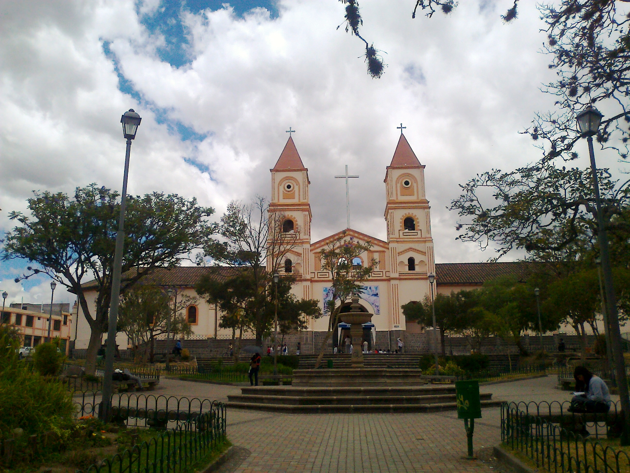 Parque e Iglesia de Yaruqui